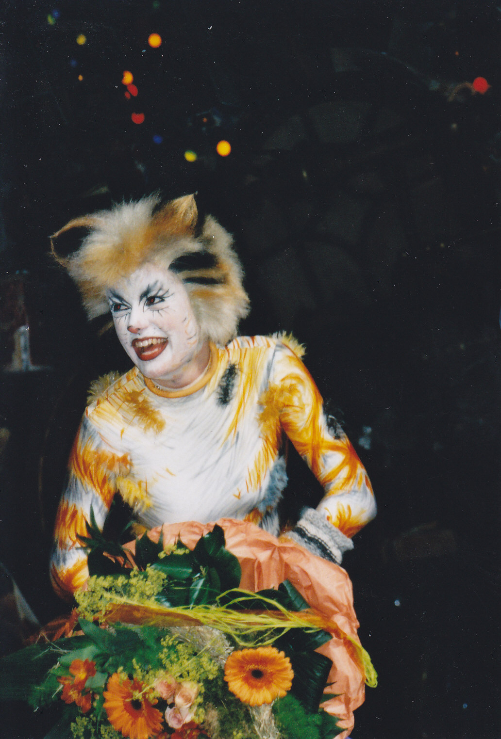 Lucy von den No Angels als Darstellerin im Musical Cats